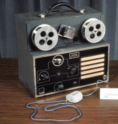 Foto de un magnetofon de alambre